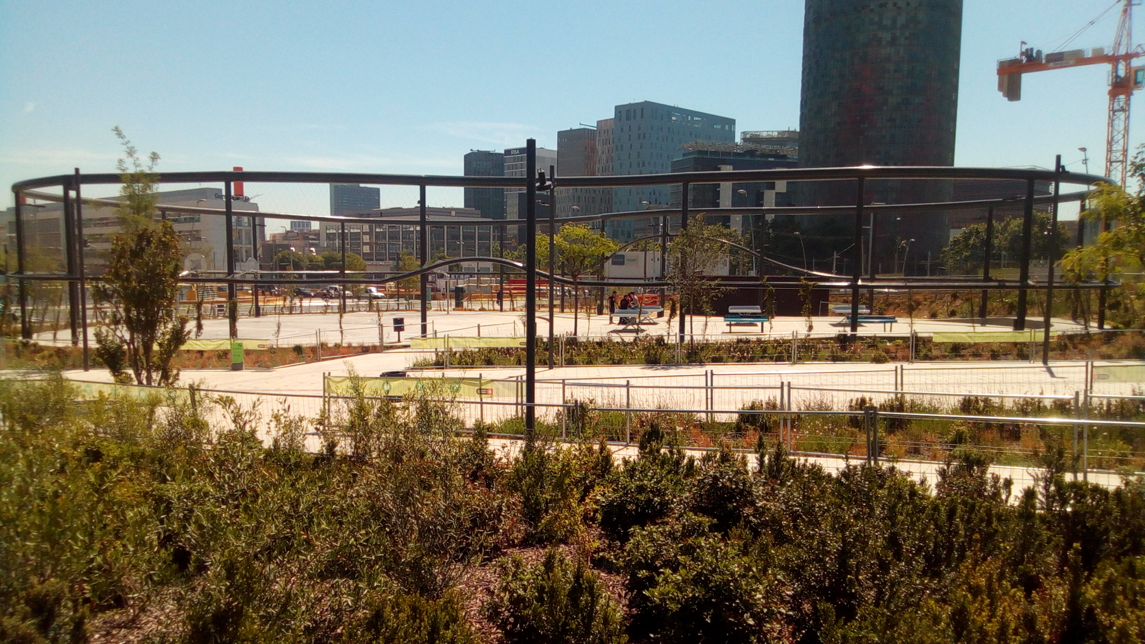 Parque de las Glorias, Espacio Juventud (área deportiva).